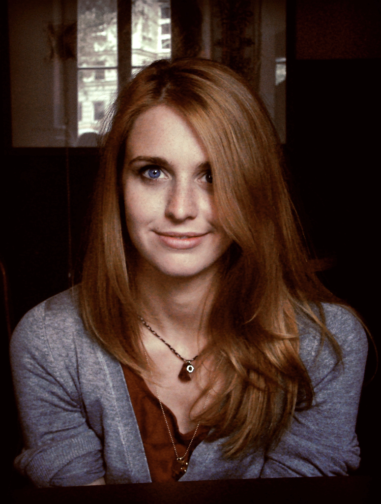 Julia Kamińska, Warszawa, 15.09.2012